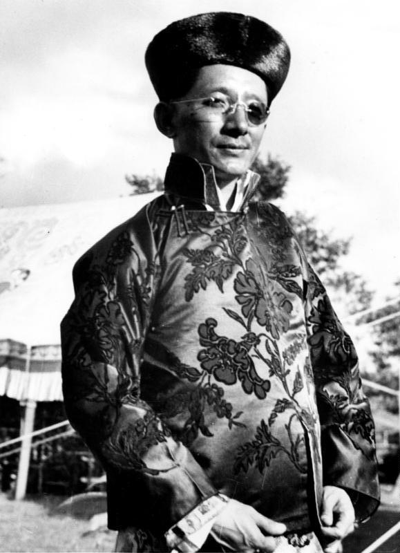 Gangtok, der Maharadscha beim Kriegstanz der Götter